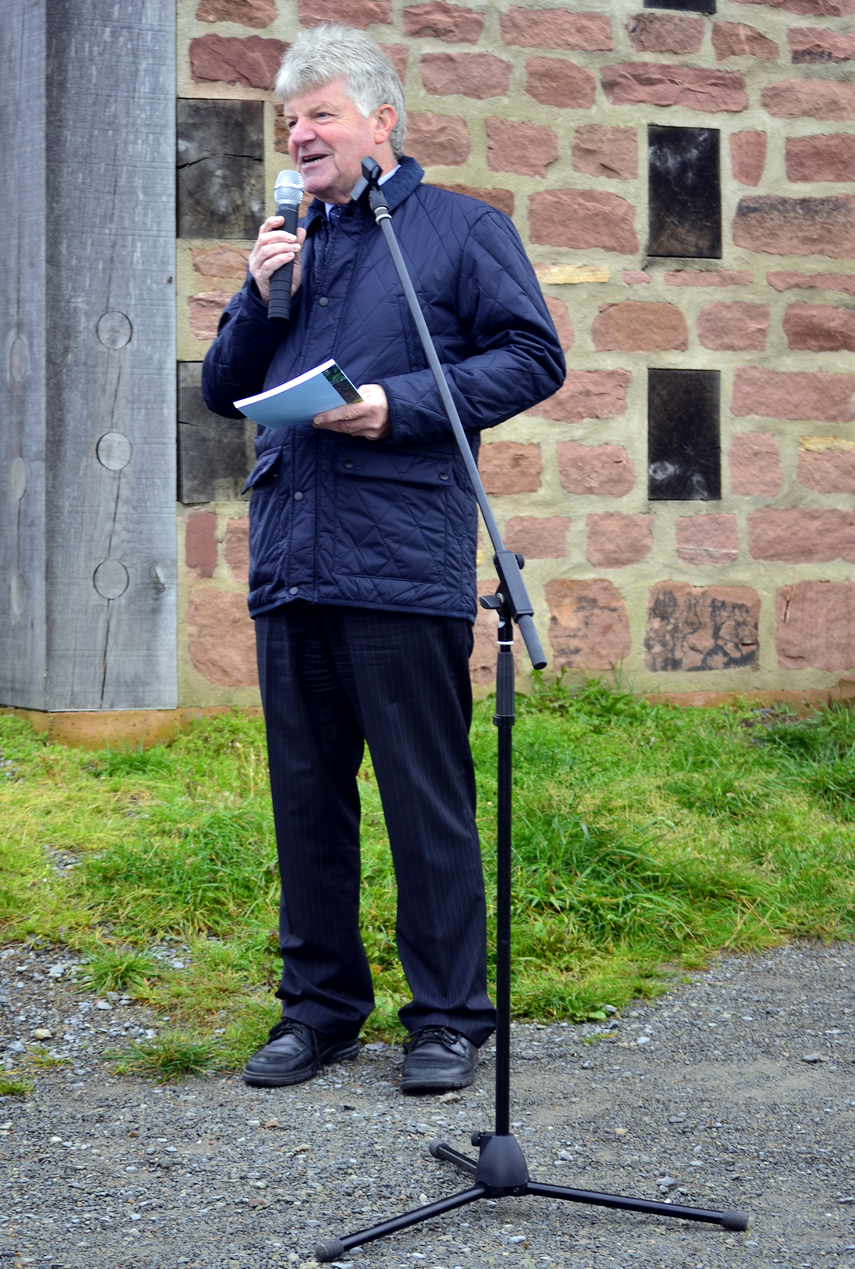 Egon Schallmayer bei der Präsentation der von ihm herausgegebenen und mitverfassten Publikation Der Odenwaldlimes. Neueste Forschungsergebnisse. Beiträge zum wissenschaftlichen Kolloquium am 19. März 2010 in Michelstadt. Saalburgmuseum, Bad Homburg 2012, ISBN 978-3-931267-07-0, (Saalburg-Schriften 8), am Wachturm Wp 10/15 des Odenwaldlimes am 9. Oktober 2012.